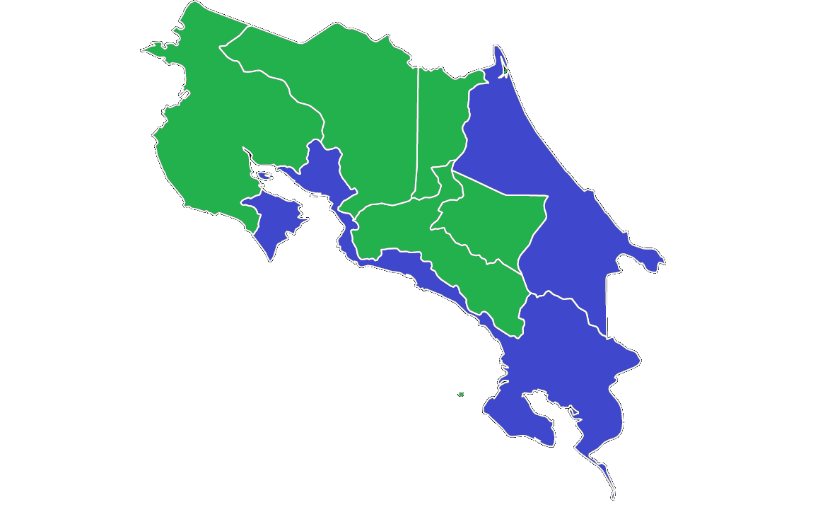 Resultados electorales por provincia de las elecciones de 1994, creación propia. PLN en verde y PUSC en azul.